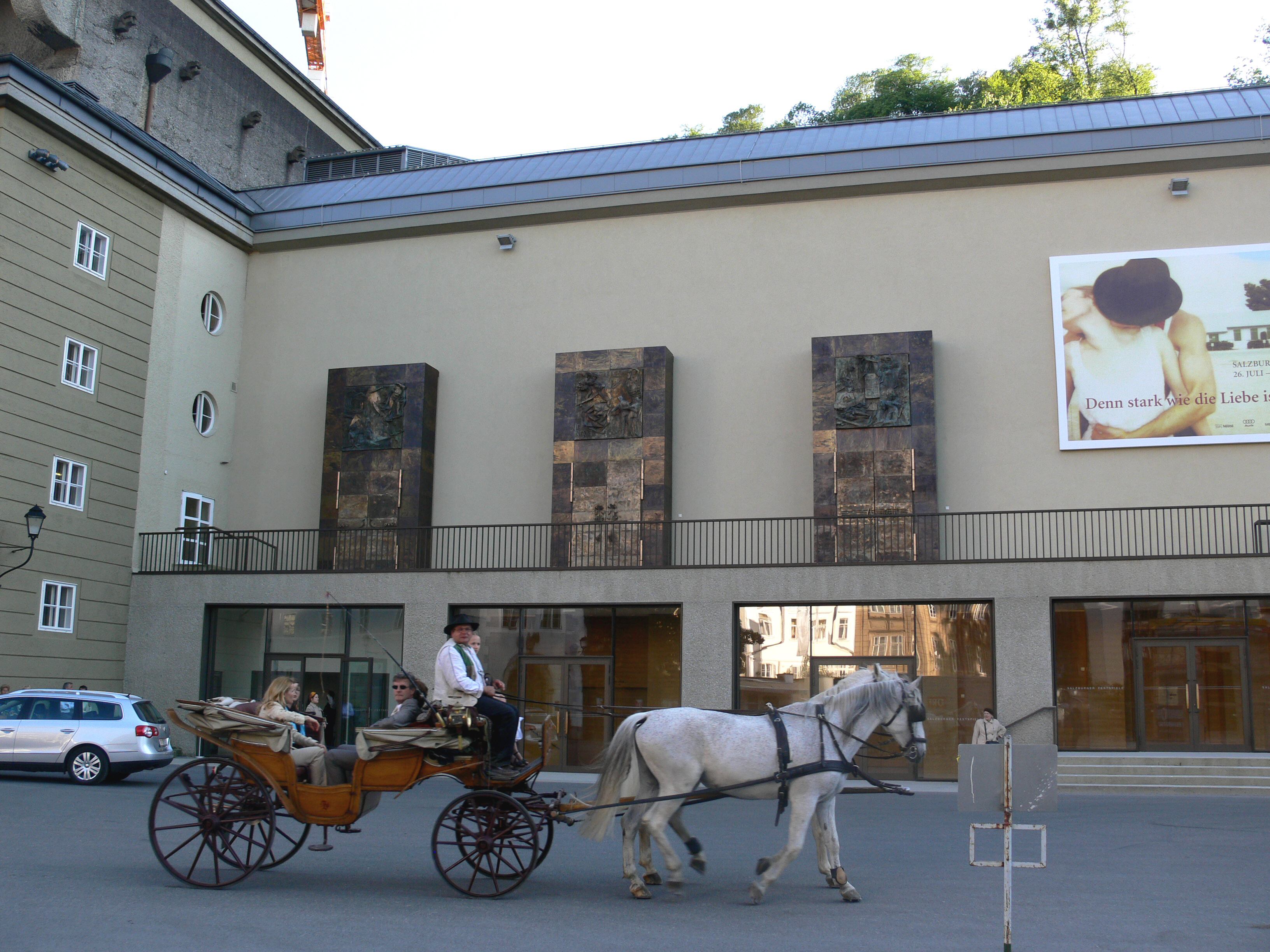 Salzburg, Festspielhauskomplex, Haus für Mozart (Kleines Festspielhaus)